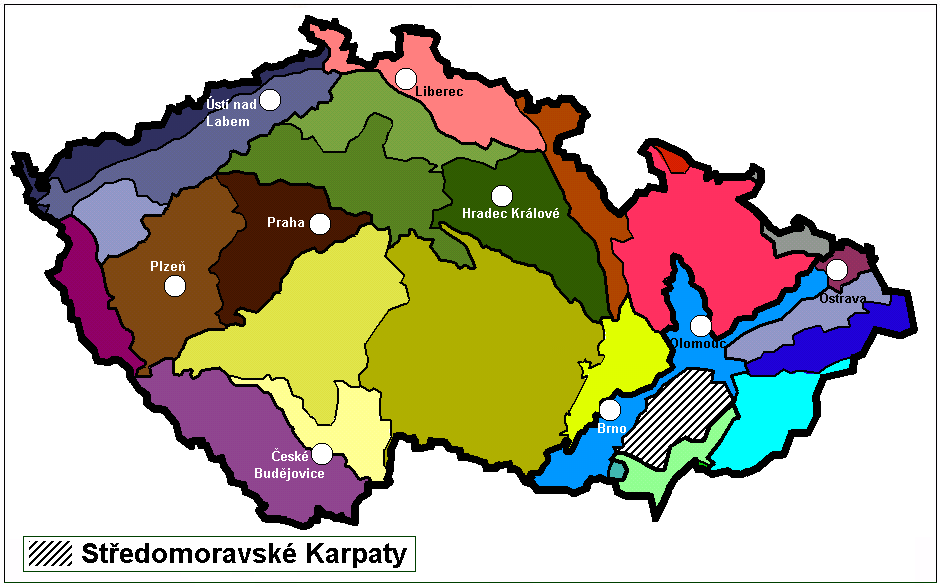 Stredomoravské_Karpaty